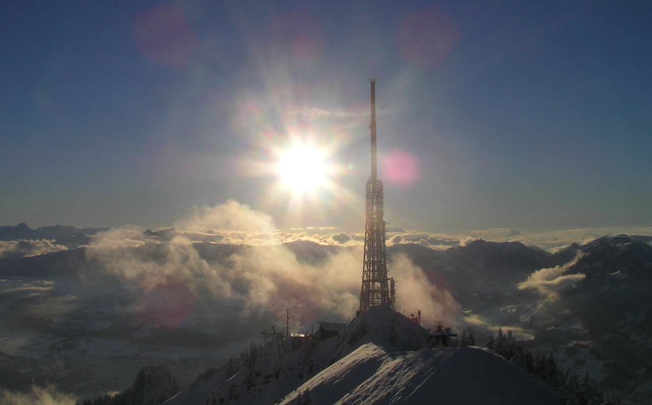 Der Sendeturm auf dem Grünten. Blick vom Gebirgsjägerdenkmal in Richtung Westen. (10.12.2006)